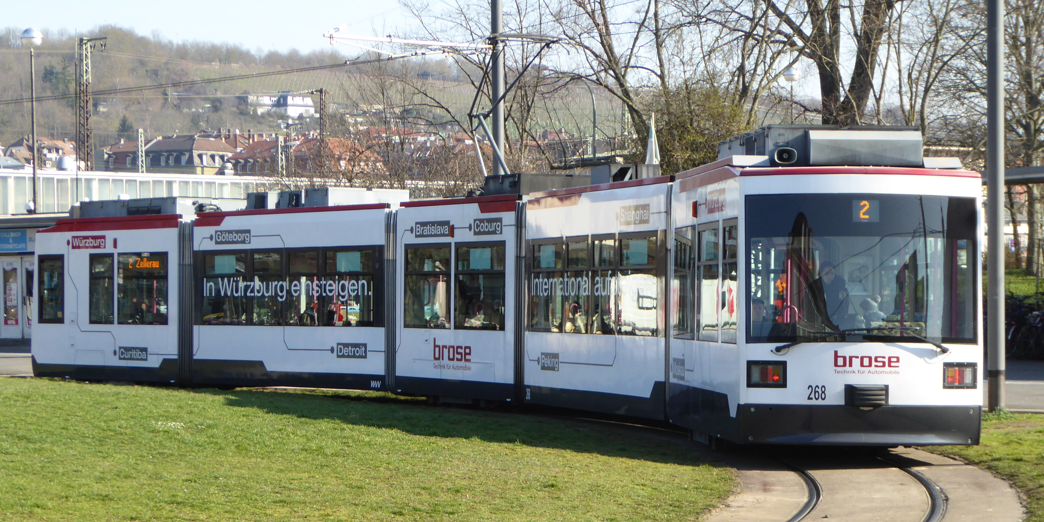 Eine GT-N-Straßenbahn auf dem Bahnhofplatz in Würzburg.